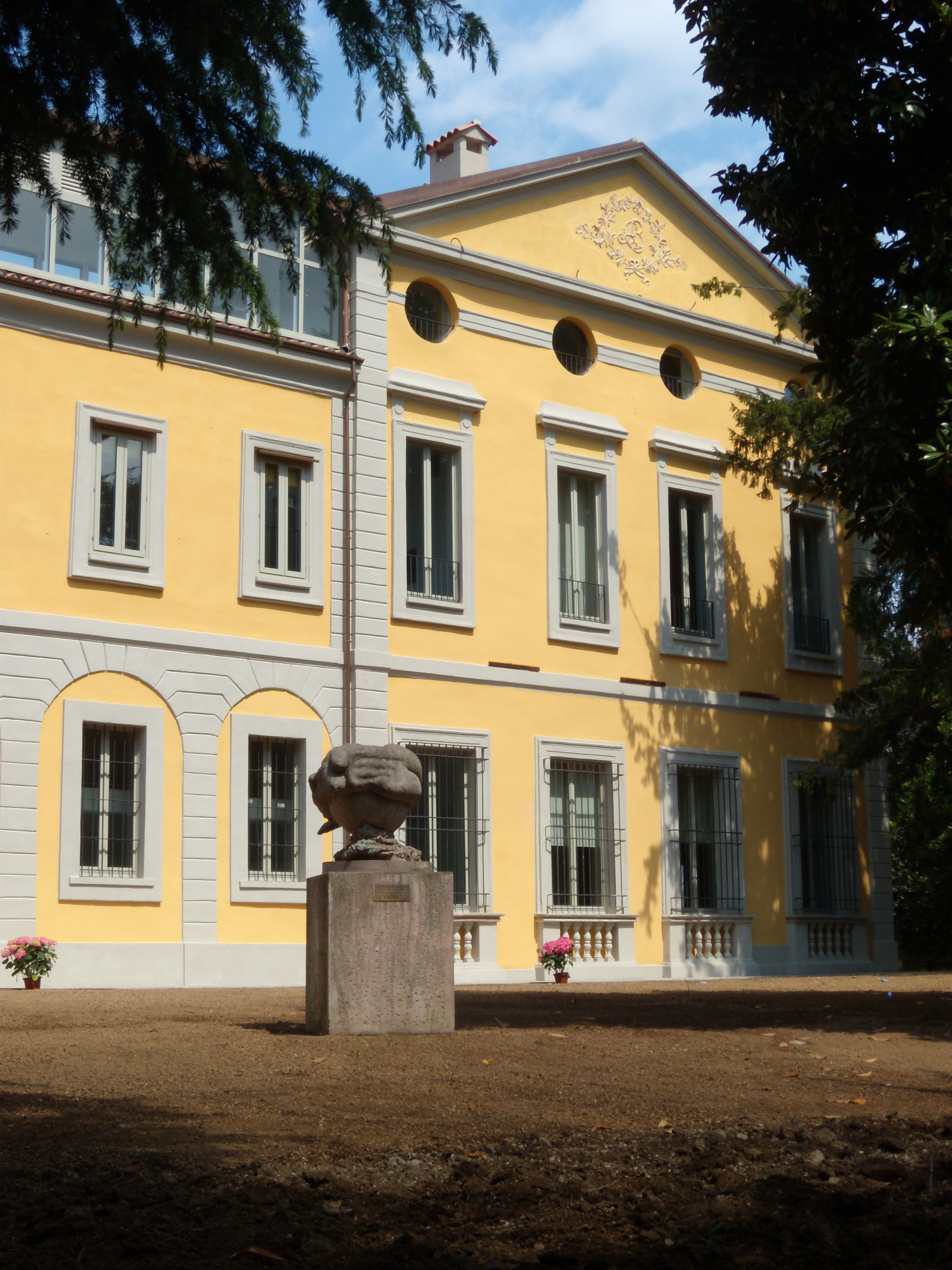 Cinisello Balsamo, Villa Forno (facciata meridionale)